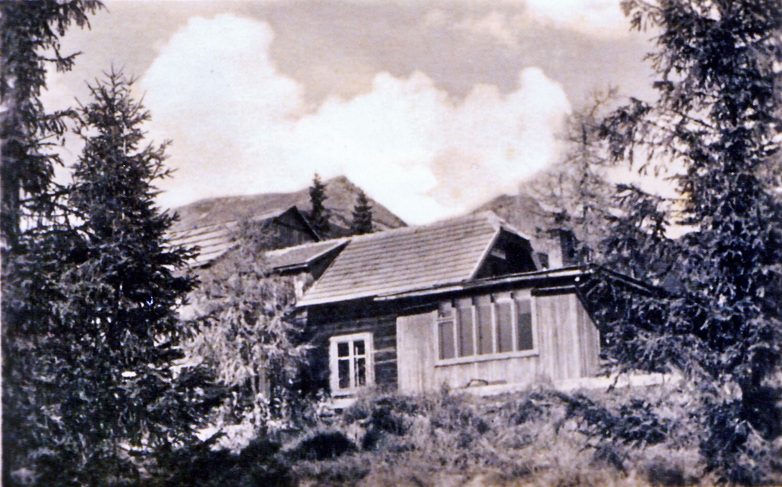 Chatu v ústí Furkotskej doliny vo Vysokých Tatrách postavili v roku 1936 bratia Daniel a Karol Lonekovci z Prostějova. Po vojne bola premenovaná na Chatu kpt. Rašu. Pôvodne sa menovala Lounekova chata. V roku 1956 vyhorela. Na jej mieste už novú nepostavili.